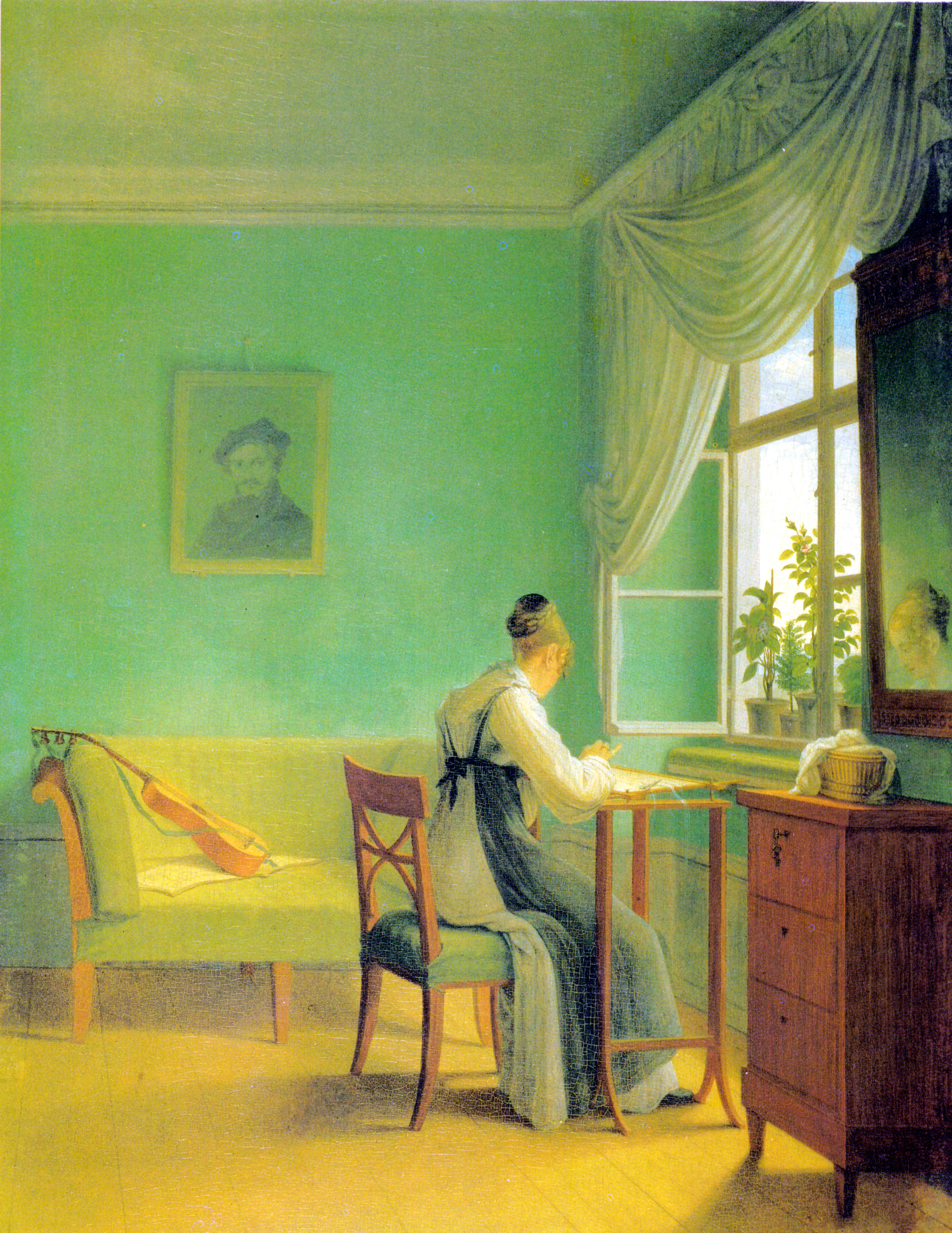 Auch: Die Stickerin (3. Fassung)